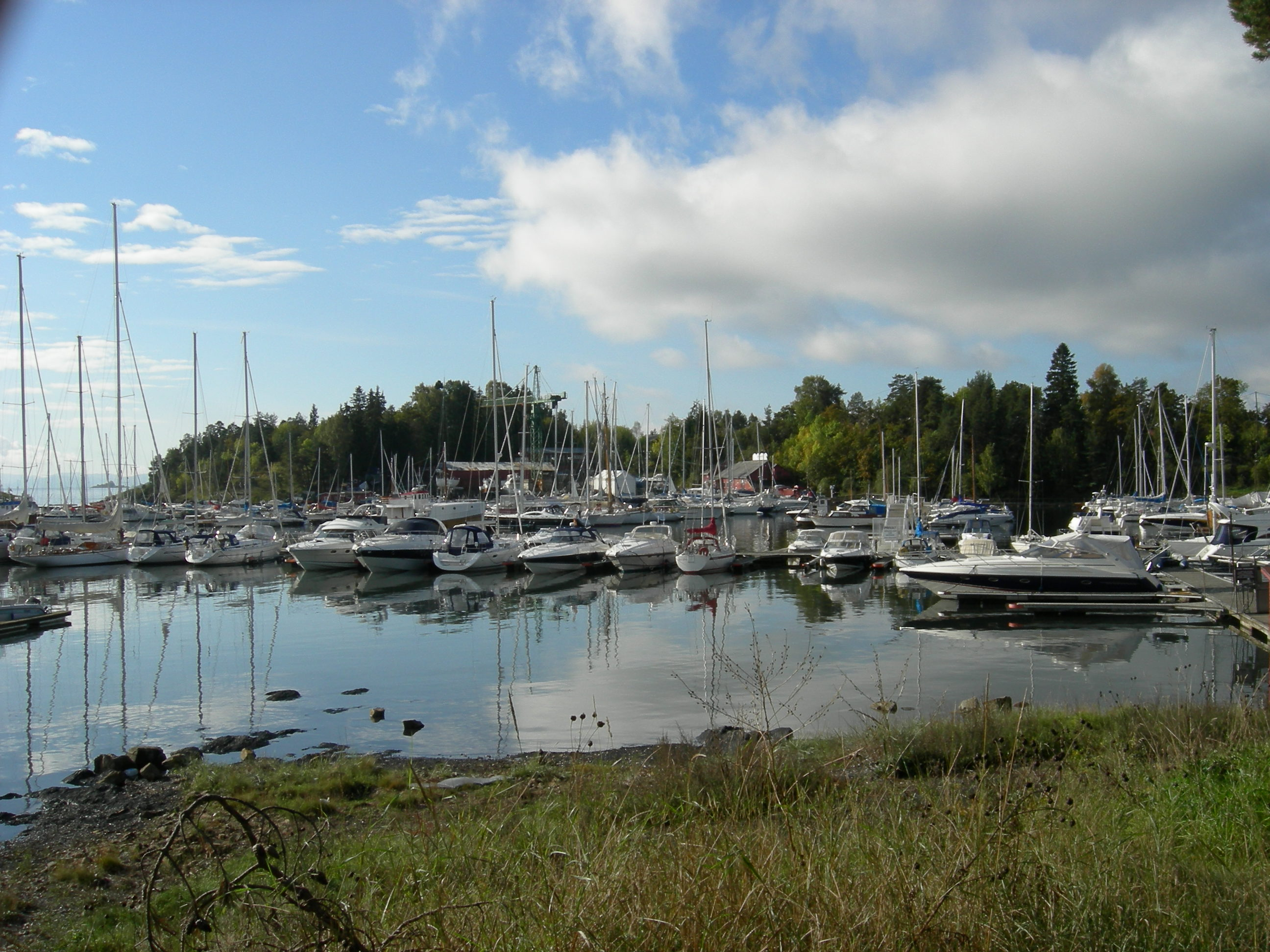 Killingen ved Bygdøy, Oslo, sett fra Bygdøy Sjøbad